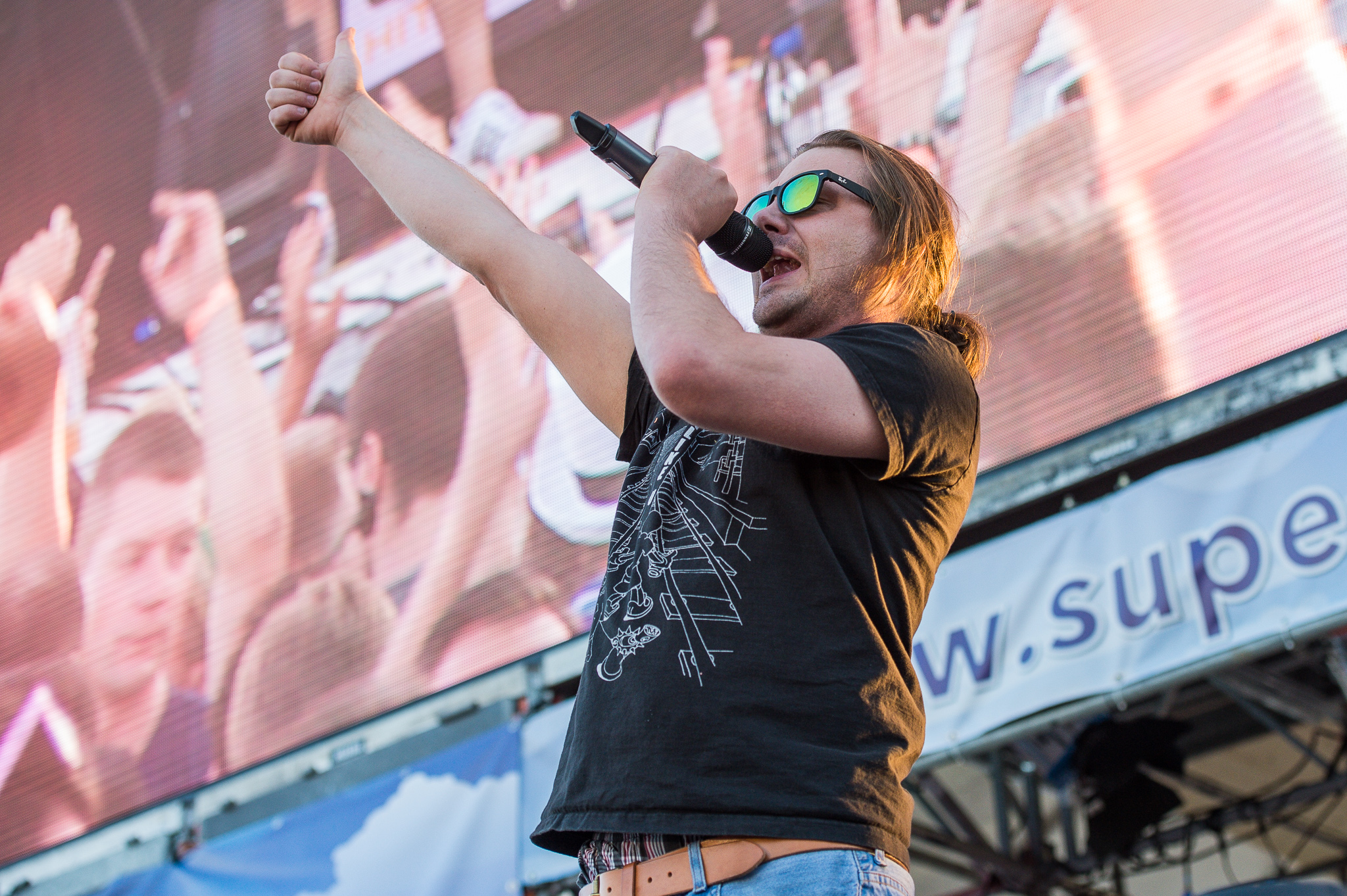 Die Atzen,Konzert,Livekonzert,Livemusik,Manny Marc,Marc Schneider,Musik,Radio N1,Super Sommer Sause 2016,Werk B Events